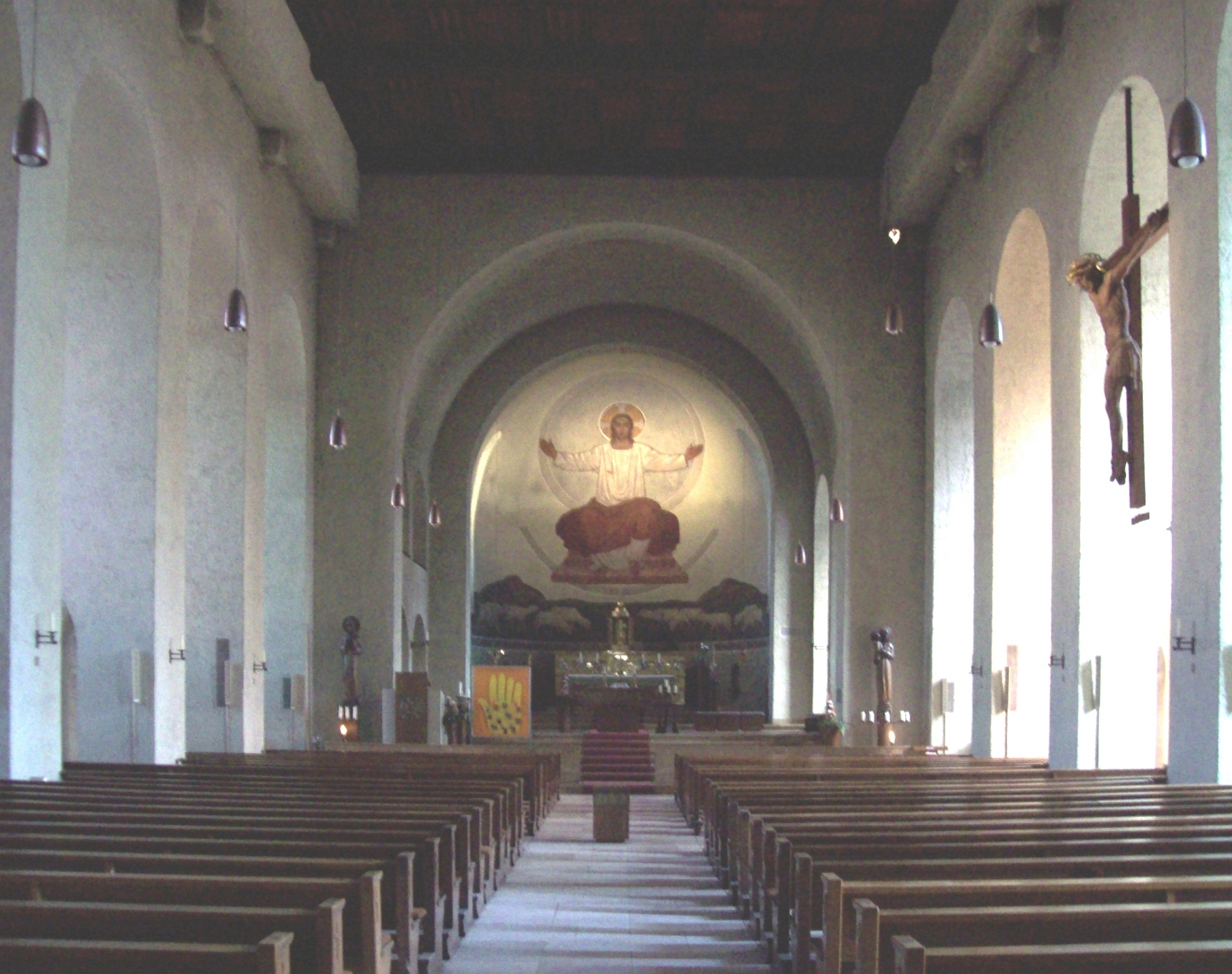 Herz Jesu Kirche Aschaffenburg (Innenansicht)